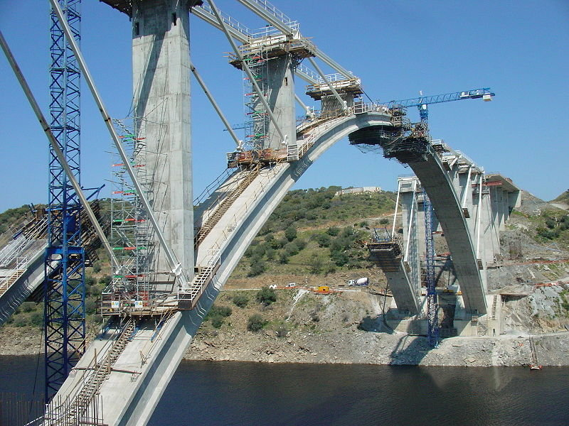 Construcción del puente sobre el río Almonte